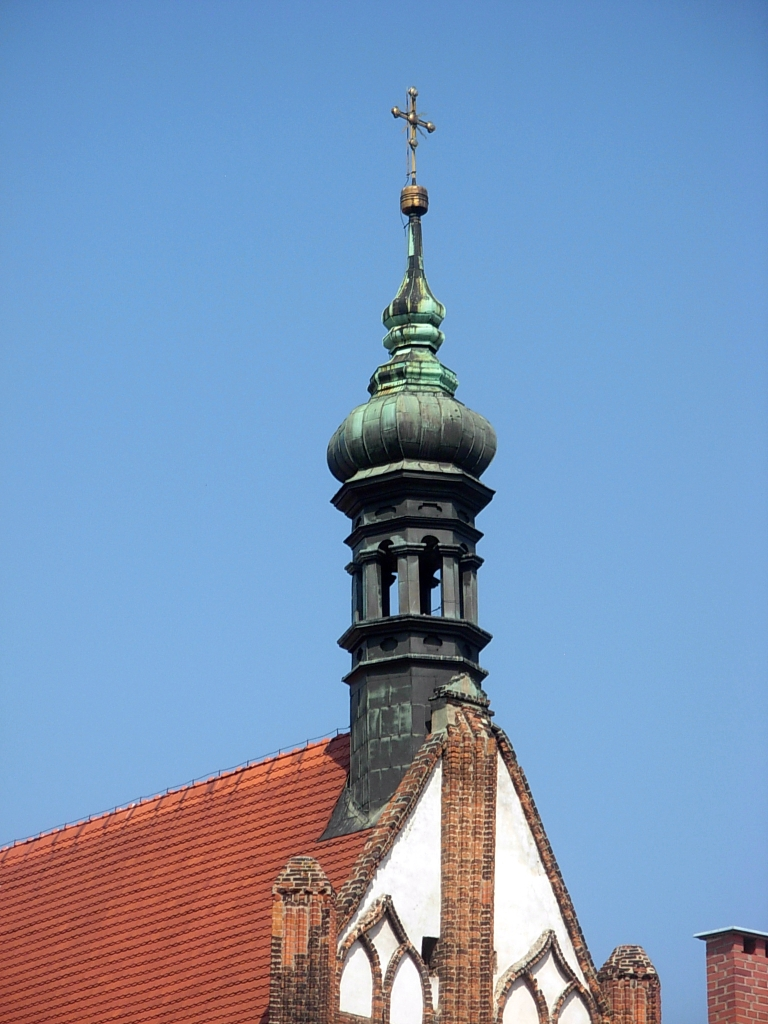 Katedra p.w. św. Marcina i Mikołaja w Bydgoszczy (XIV-XV wiek)